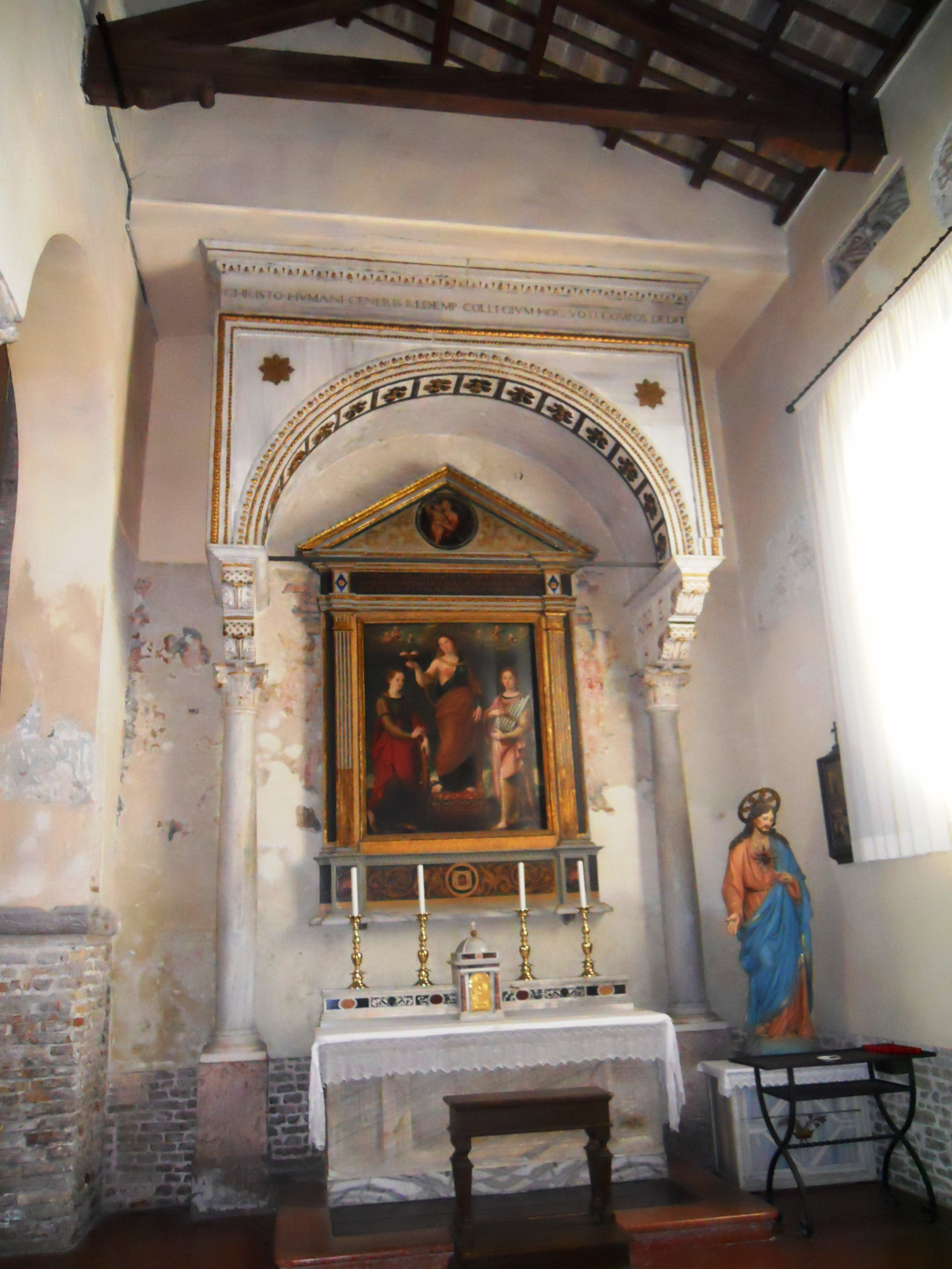 L'altare di Sant'Agata con la pala di Luca Longhi (1546) Sant'Agata fra le Sante Cecilia e Caterina d'Alessandria.